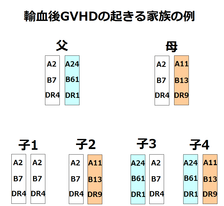 輸血後GVHDがおきる家族の1例